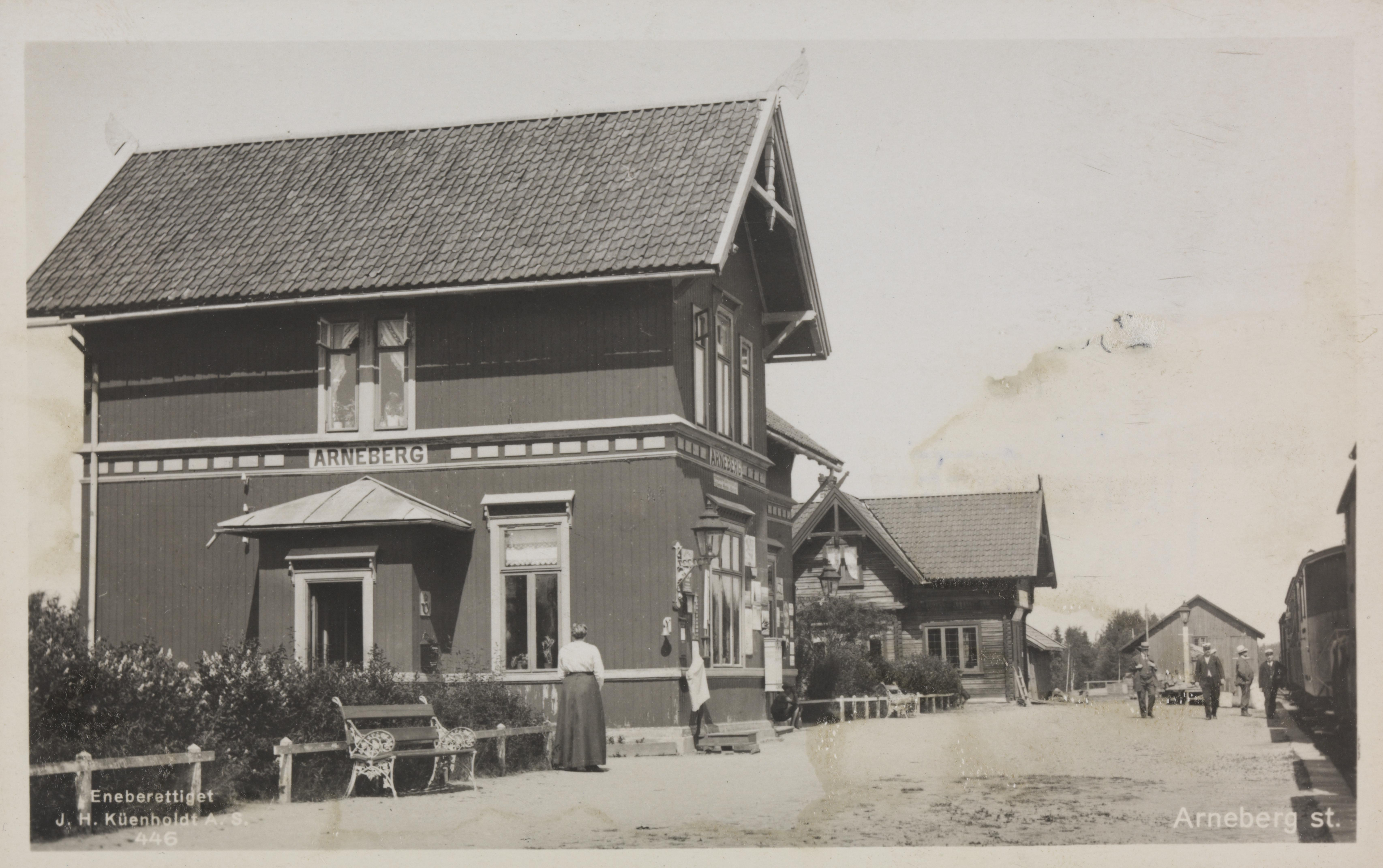 Bildet er hentet fra Nasjonalbibliotekets bildesamling Arneberg,Arneberg stasjon, Åsnes, Hedmark